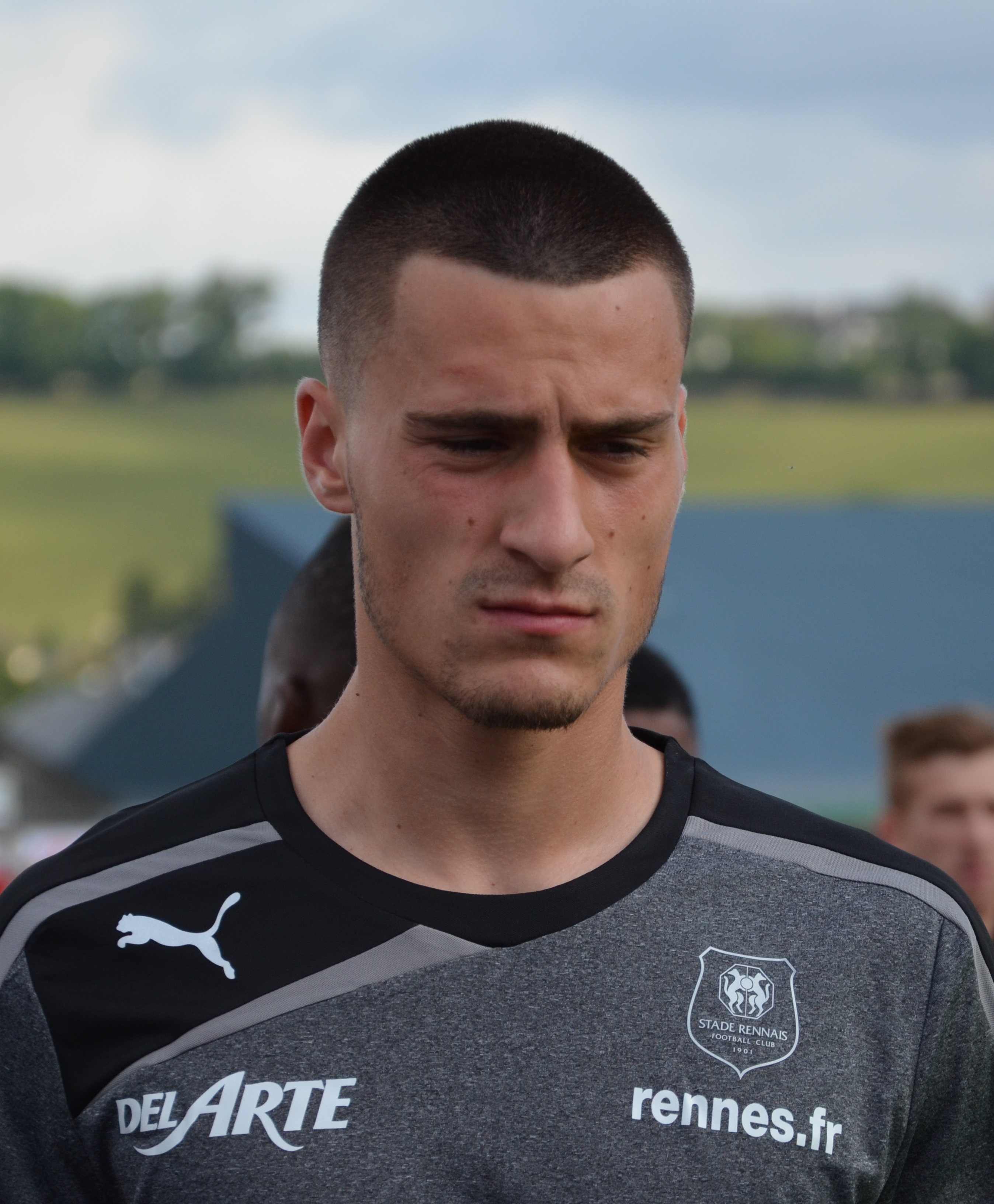 Photographie prise à l'occasion de la rencontre amicale opposant le Stade Malherbe de Caen au Stade rennais, le 9 juillet 2014 au stade Pierre-Comte de Vire. Ici, Gjoko Zajkov.